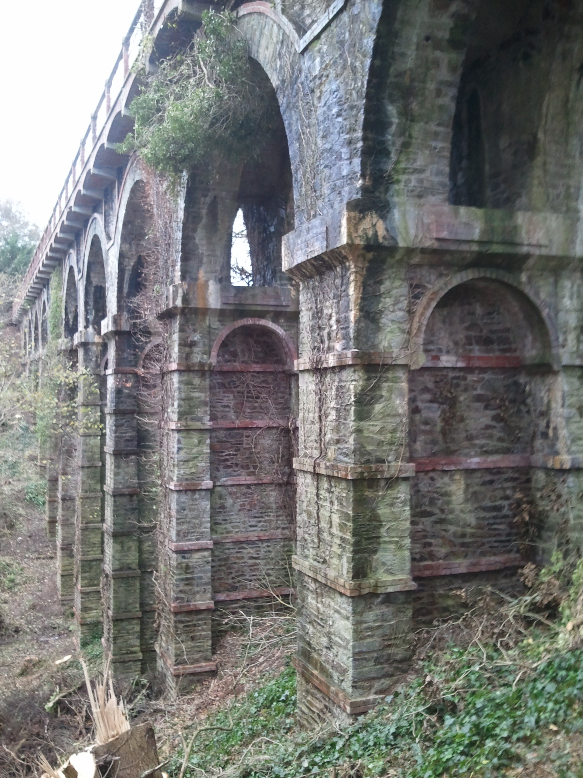 Viaduc de Kerdéozer, Plouguiel, France, 12/2012